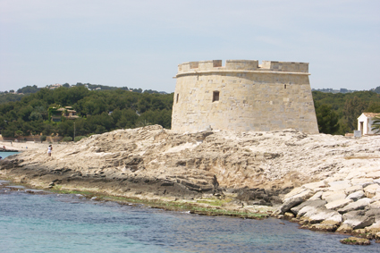 Fortí-castell de Moraira (Teulada). Segle XVIII